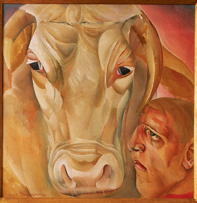 Коллекция Майи и Анатолия Беккерманов (США).